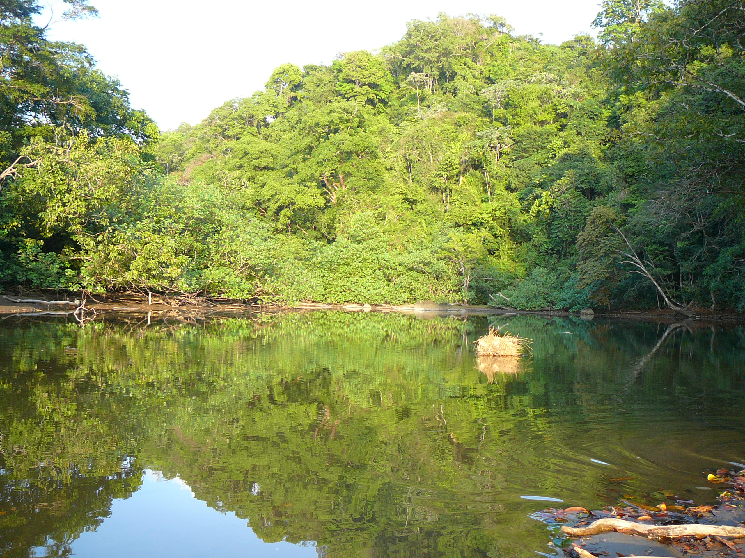 Vista del paisaje natural de Jaqué, Darién